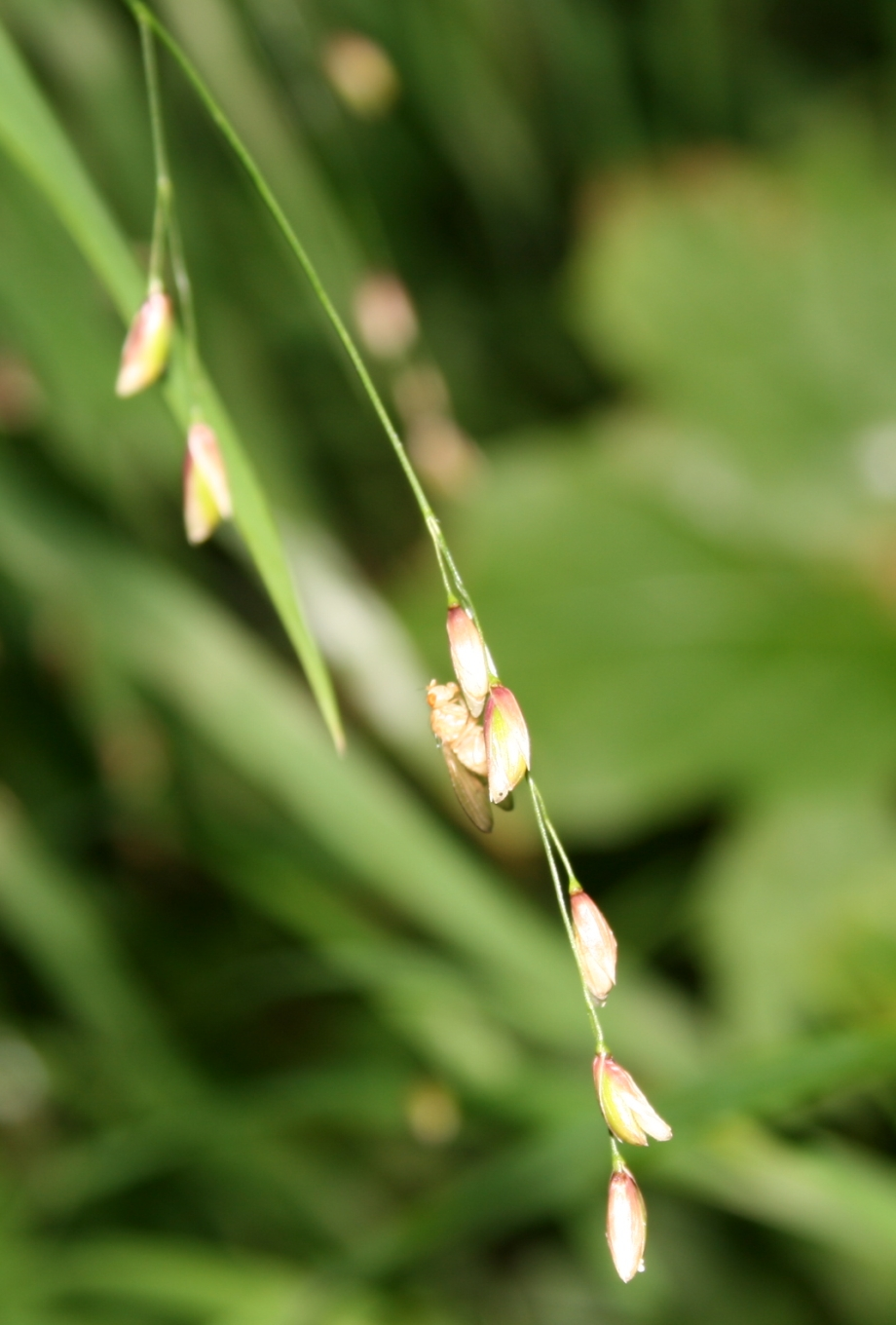 Melica uniflora: Seeds.